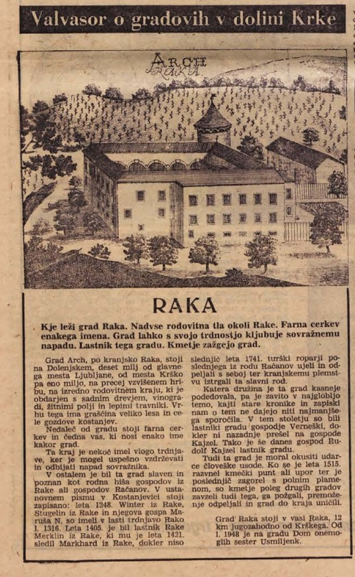 Dolenjski list o gradu Raka 1967